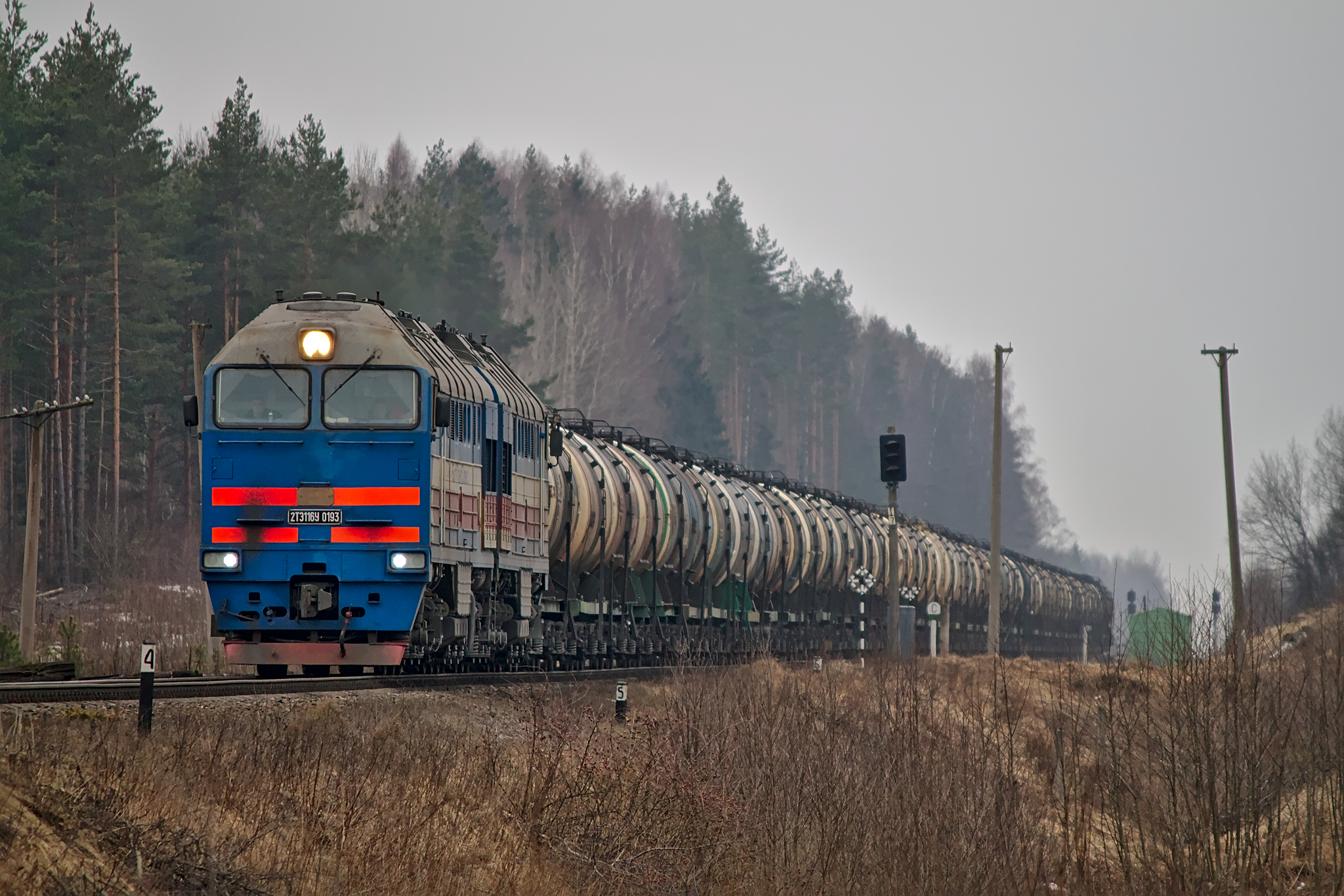 2ТЭ116У-0193, Серебрянка - Луга-I. см. фото 583109 в альбоме автора